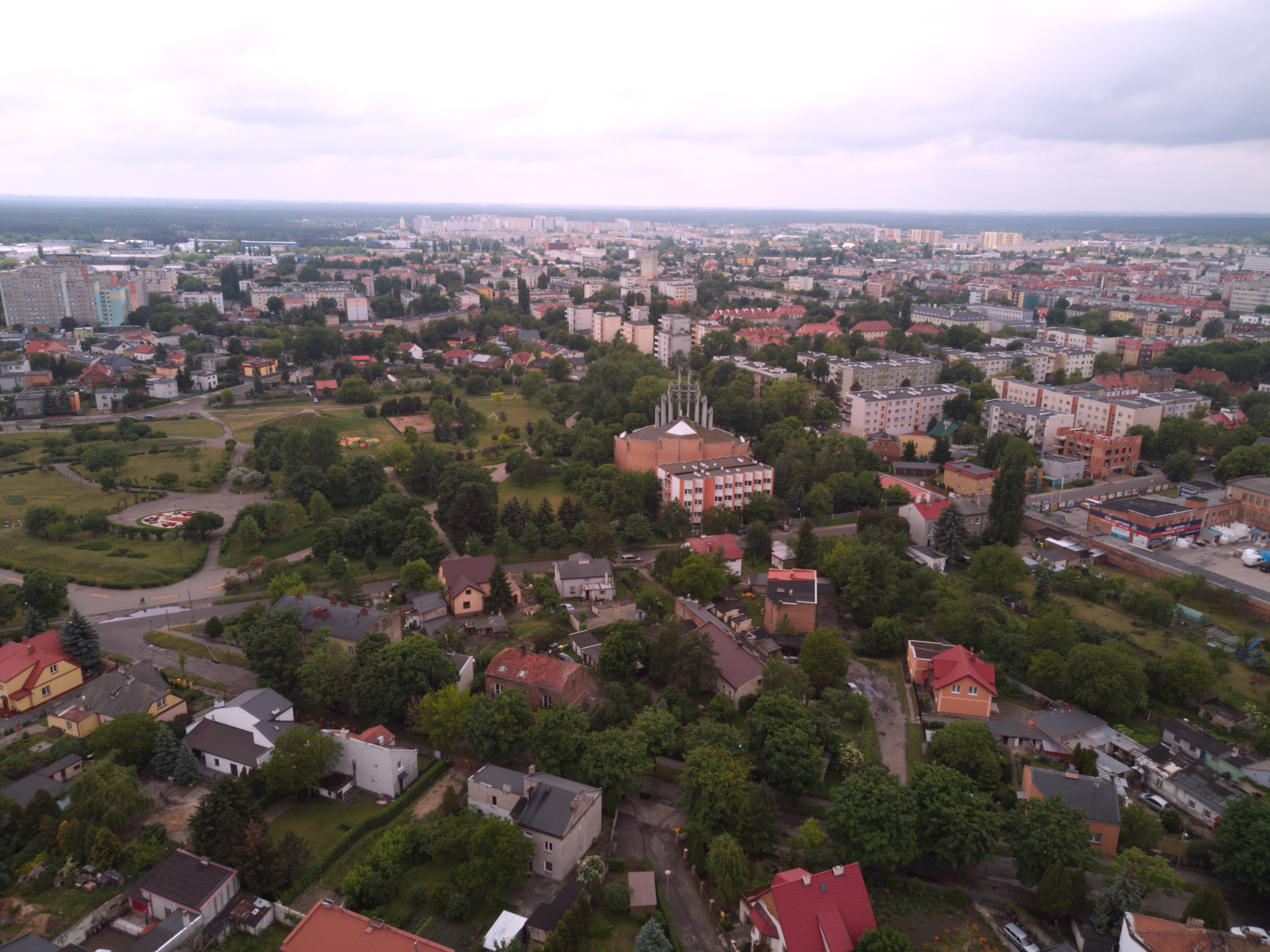 Śródmieście (2020)